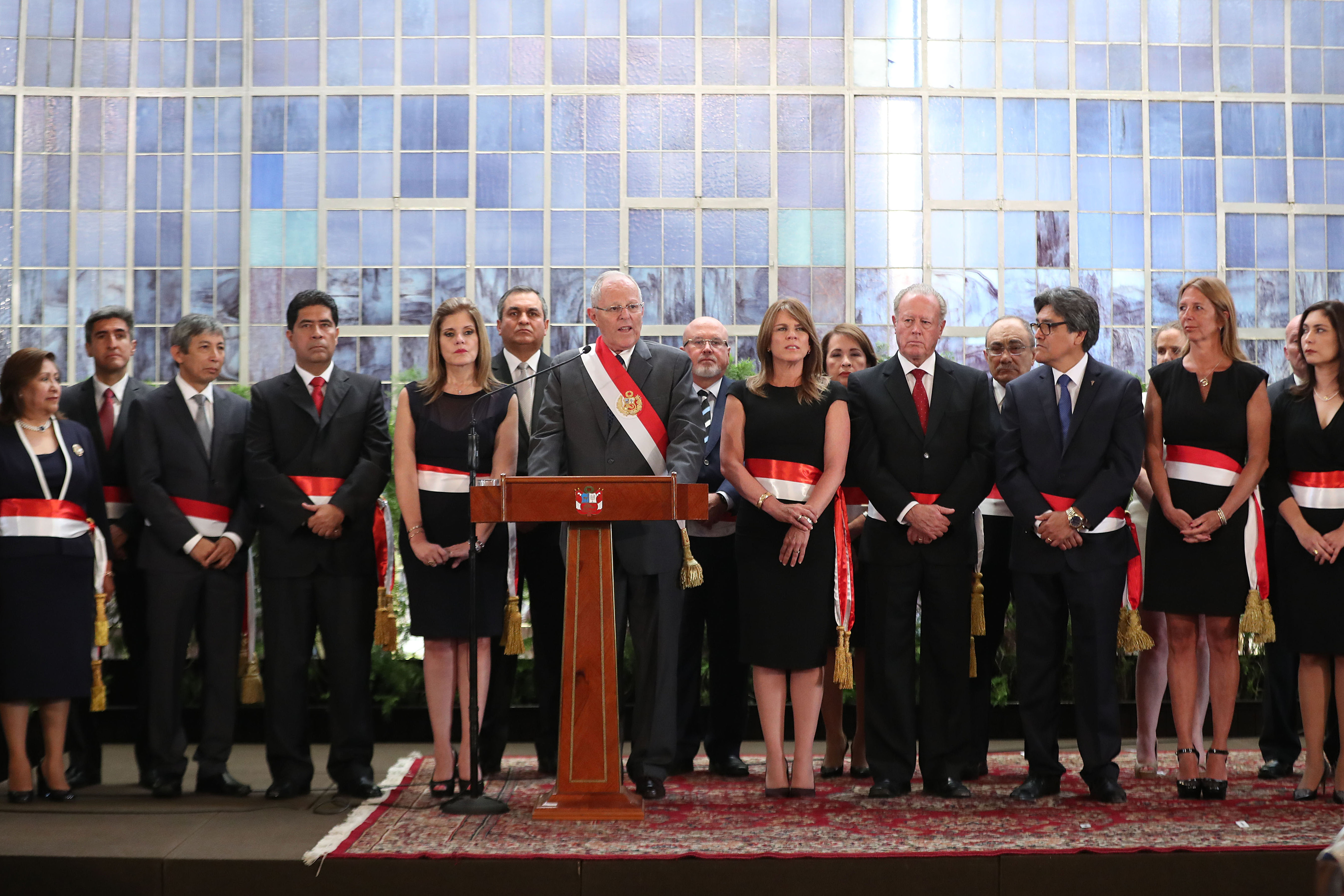 PPK y su gabinete de la Reconciliación, que juró el 9 de enero de 2018.